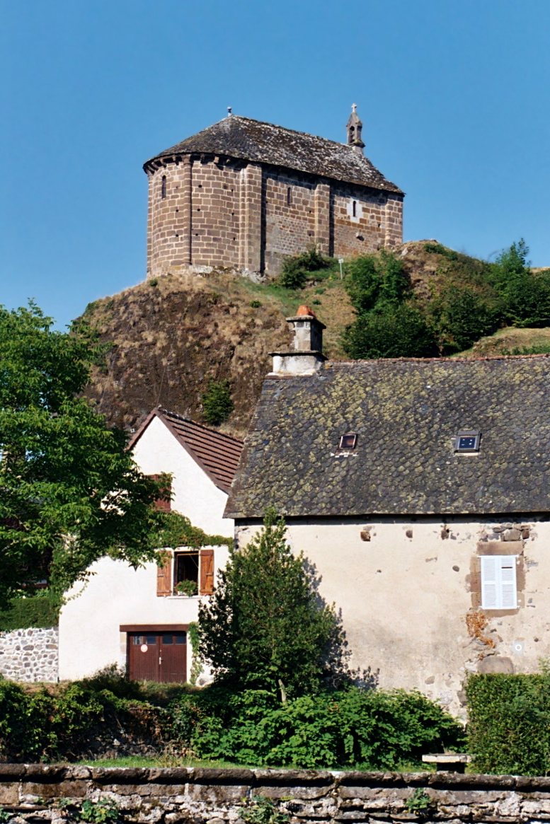 France - Auvergne - Cantal - Chapelle Notre-Dame du Château de Saignes